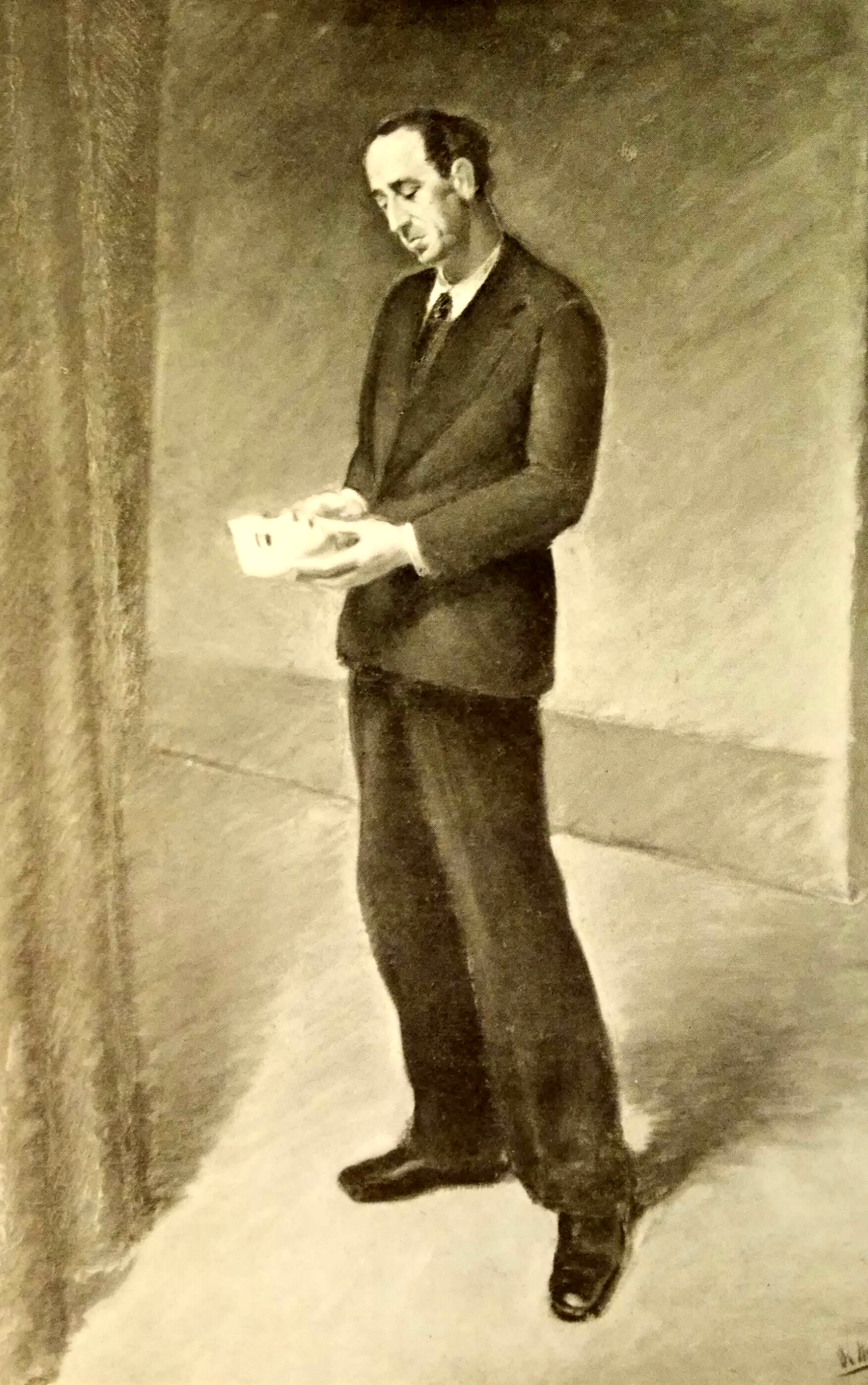 Immagine dal dipinto di Otello de Maria, proprietà di Piovesan Luciano